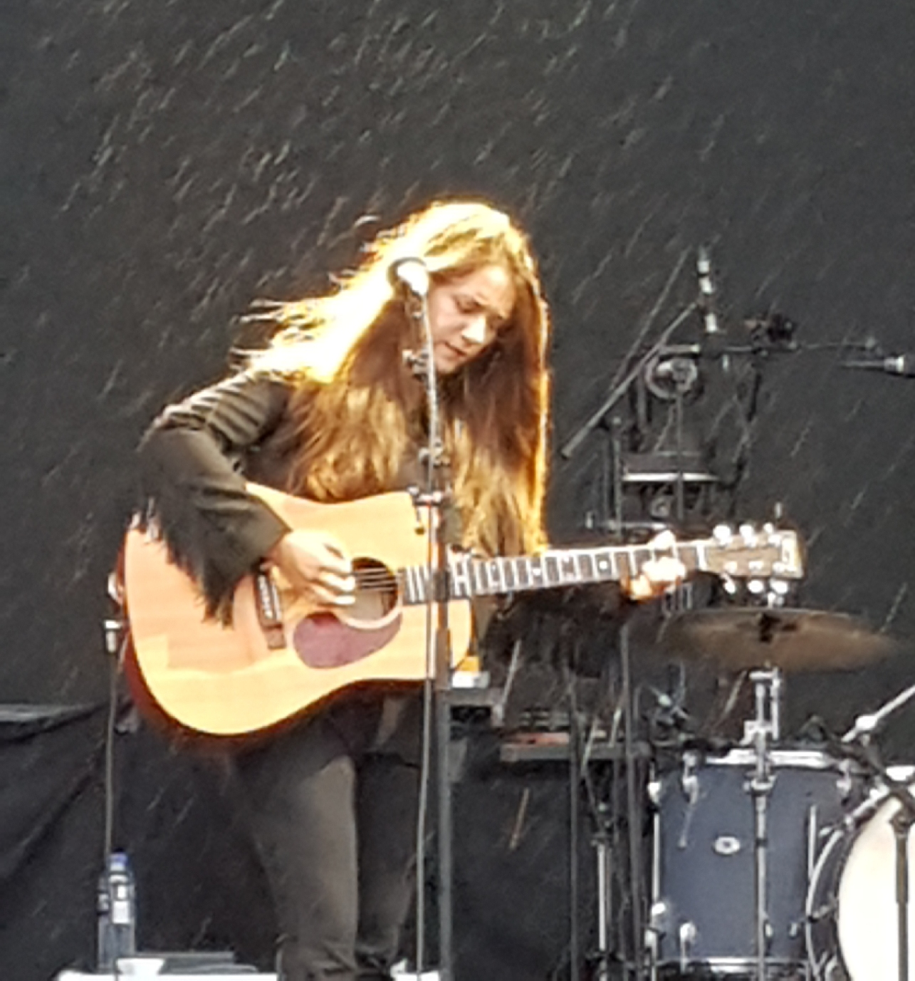 Hedlundadungen Umeå, 18:e augusti 2018. Foto: Annelie Nilsson